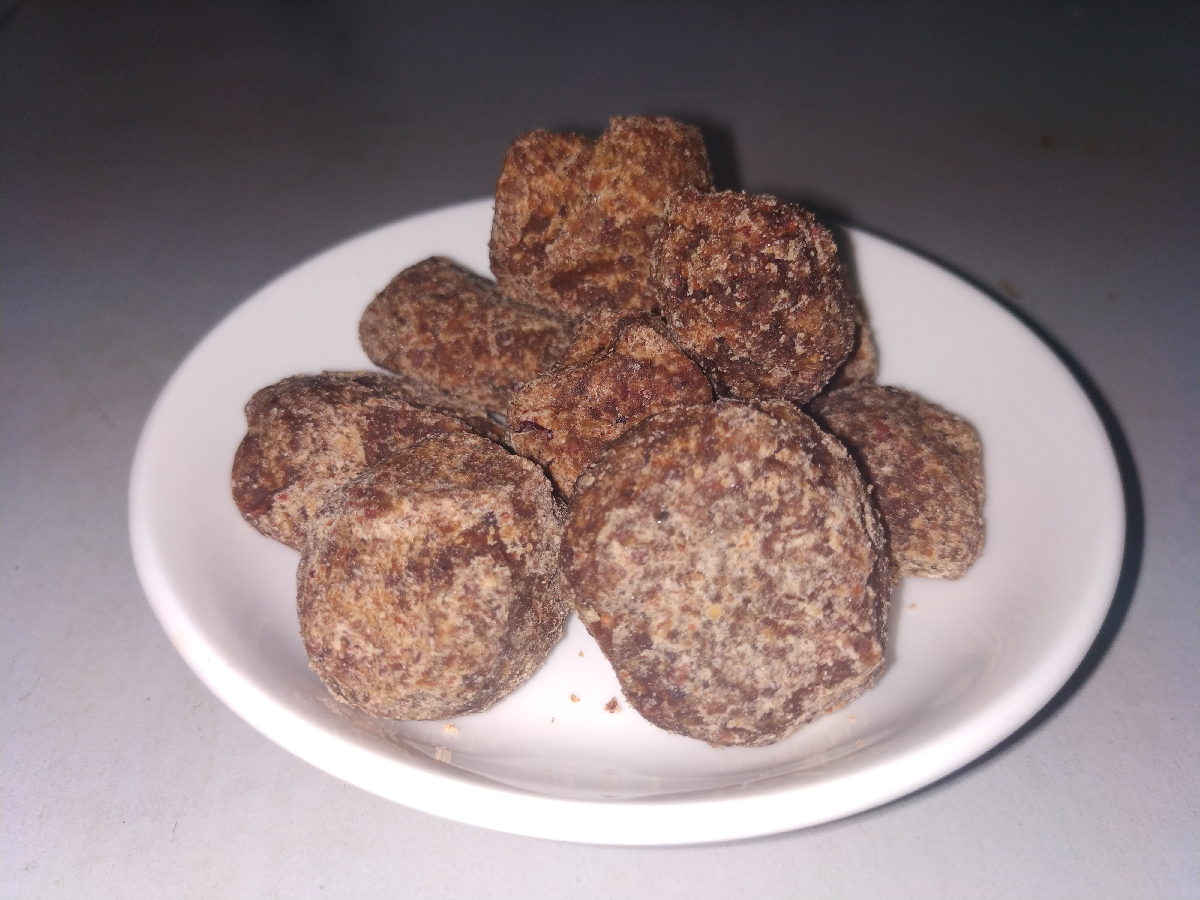 ဇီးသီးမှုန့်ဖြင့်လုပ်ထားသော ထန်းလျက်ခဲများ